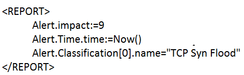 Description résumée d'une alerte avec le langage ADeLE